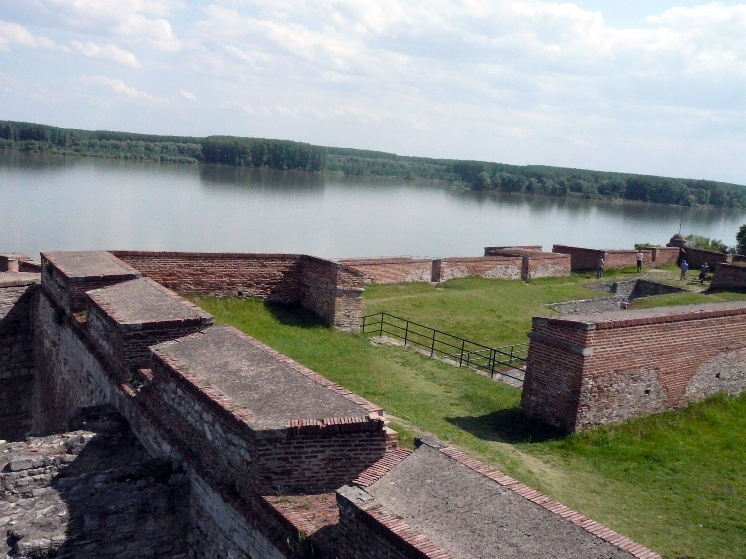 Baba Vida Fortress,Vidin,Bulgaria